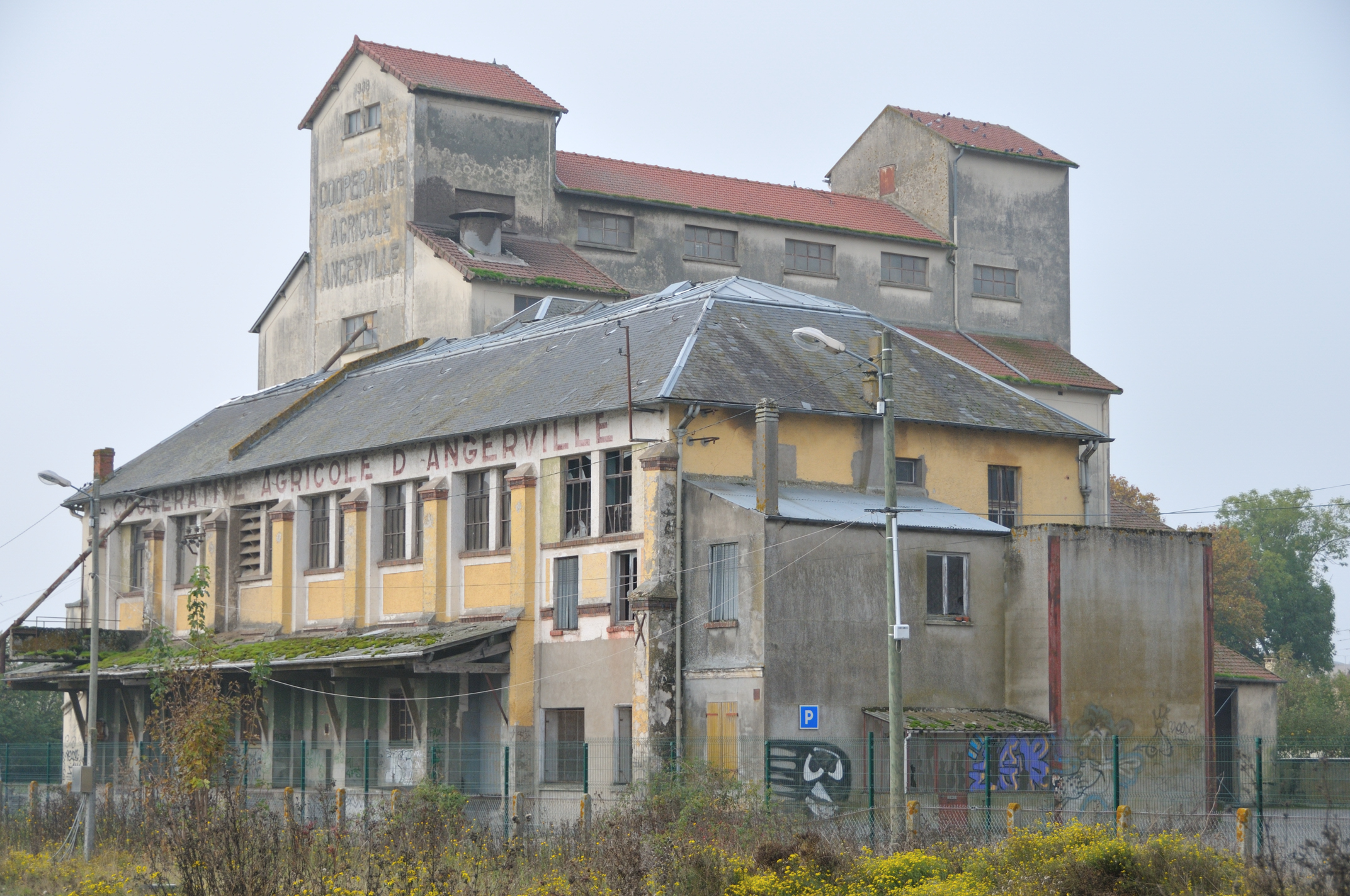 Coopérative agricole d'Angerville, Essonne, France